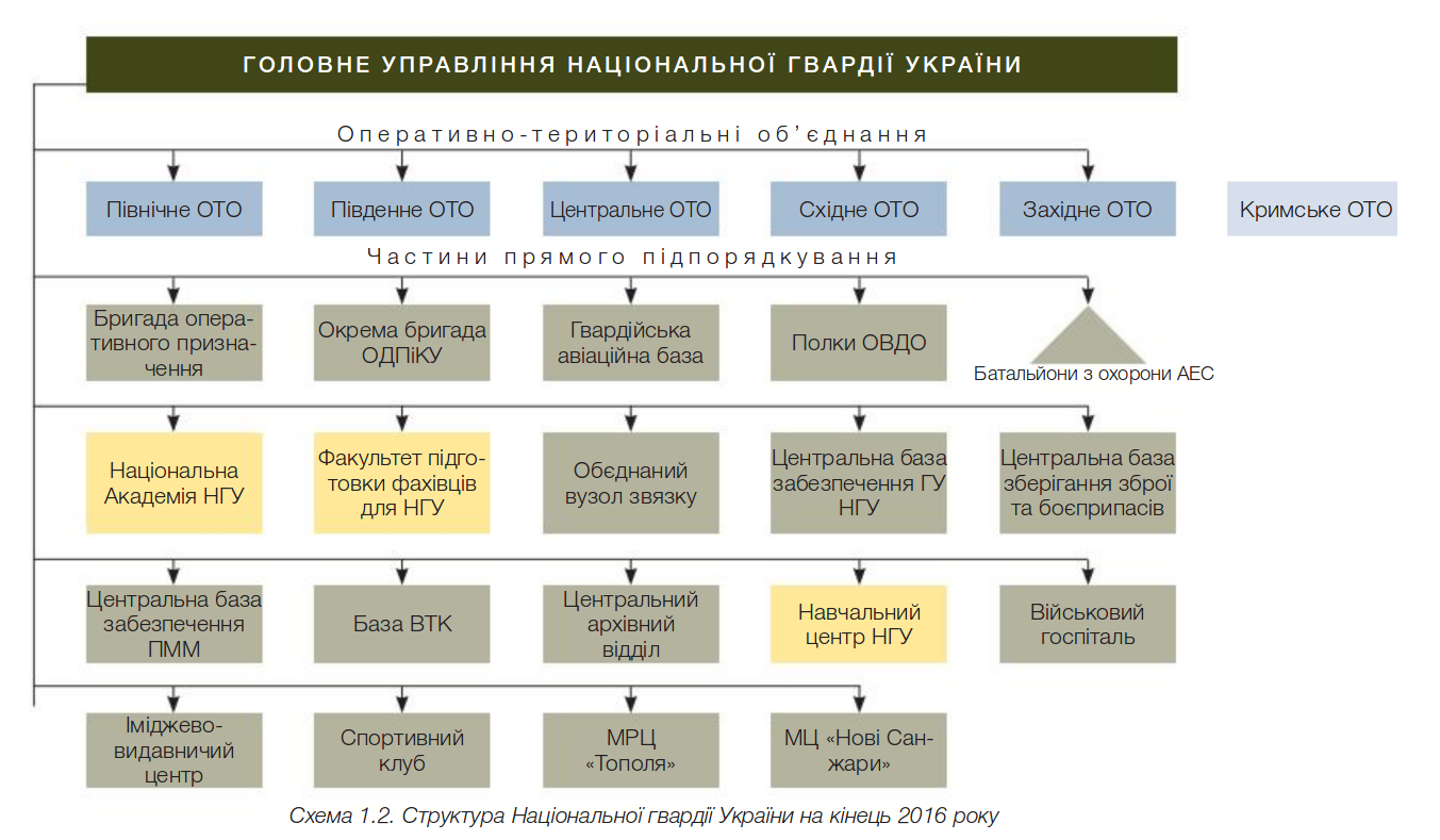 Національна гвардія України, Організаційна структура